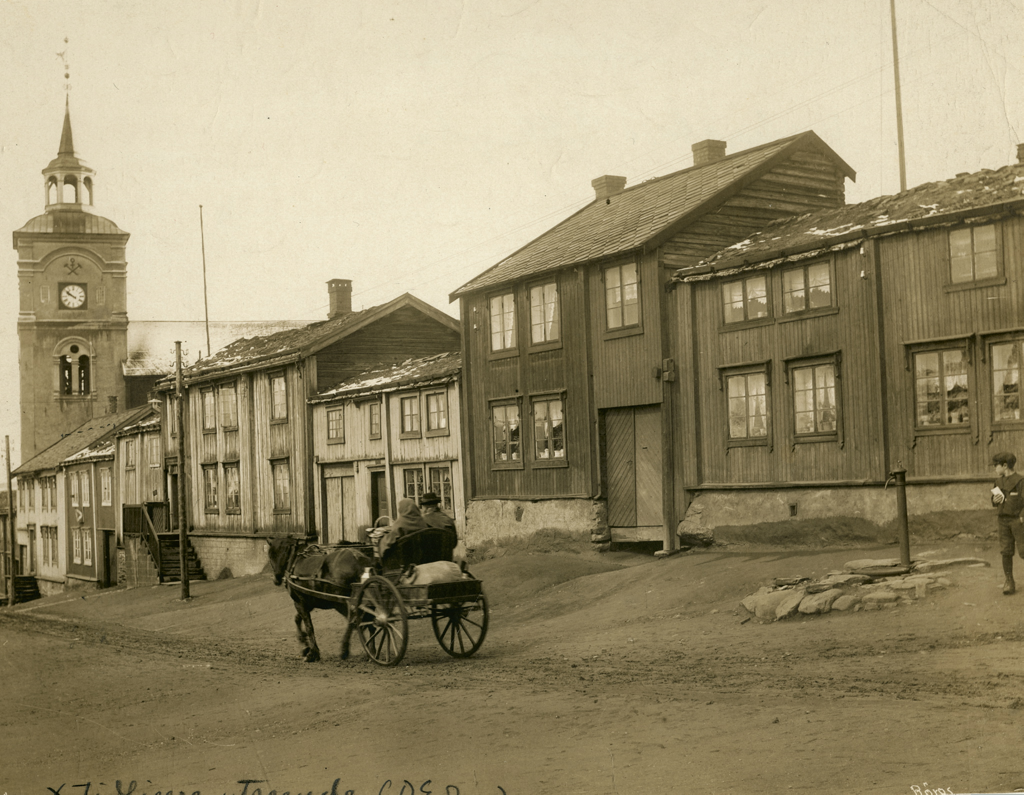 Solbergs plass - Kjerkgata Fotograf: Wilse, Anders Beer (1865-1949) Datering: Ca 1900 til 1910 Sted: Røros by Sør-Trøndelag Se flere bilder på Kulturminnebilder